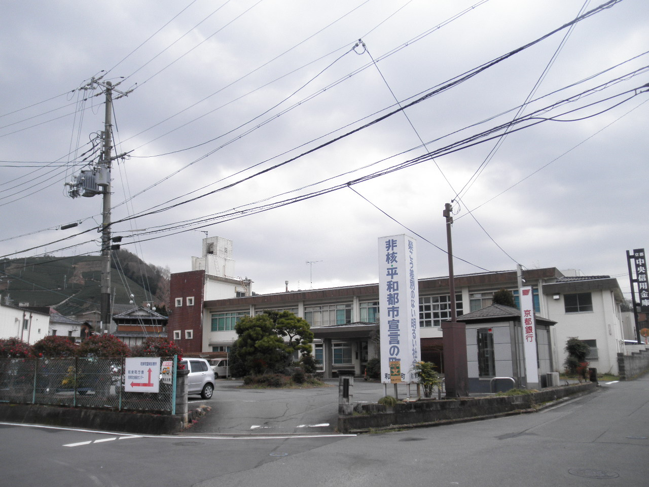 和束国民健康保険事務所